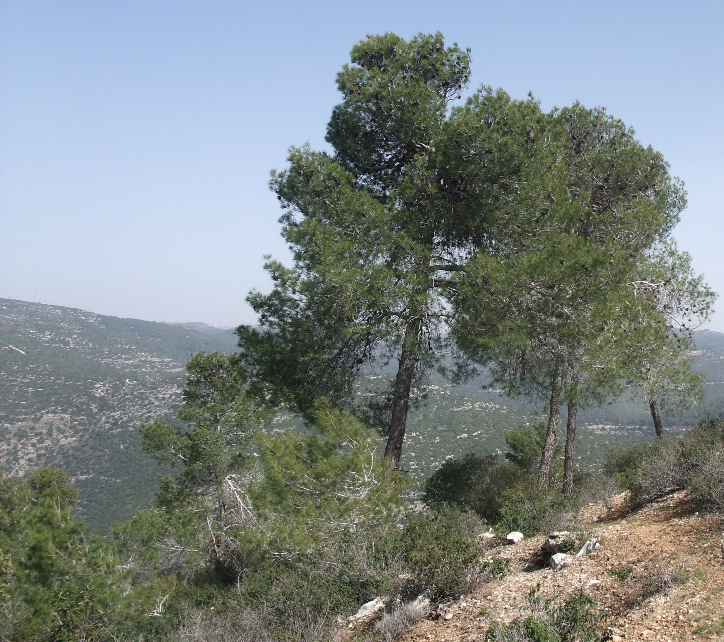 עצי אורן בהרי ירושלים